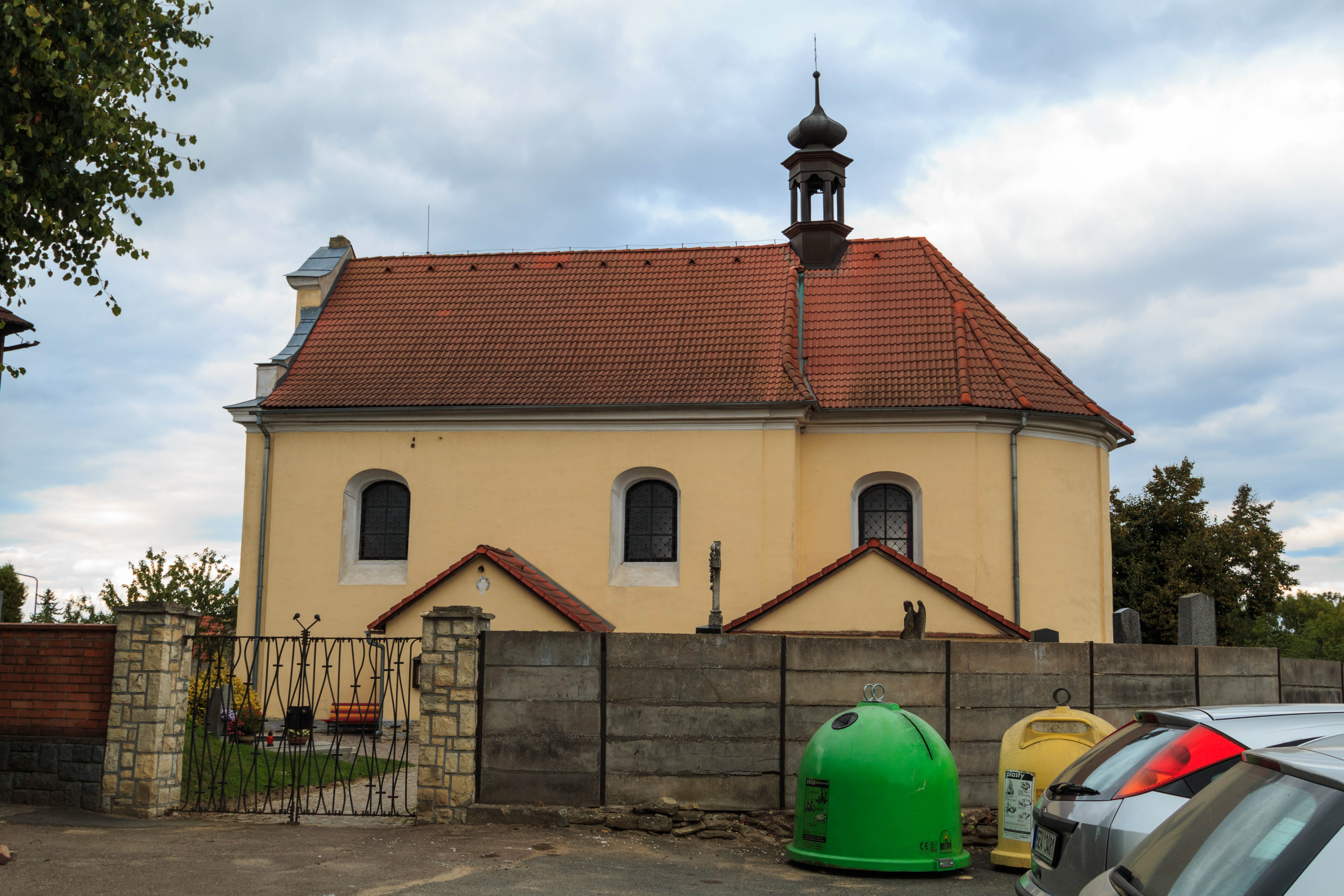 Řepníky kostel